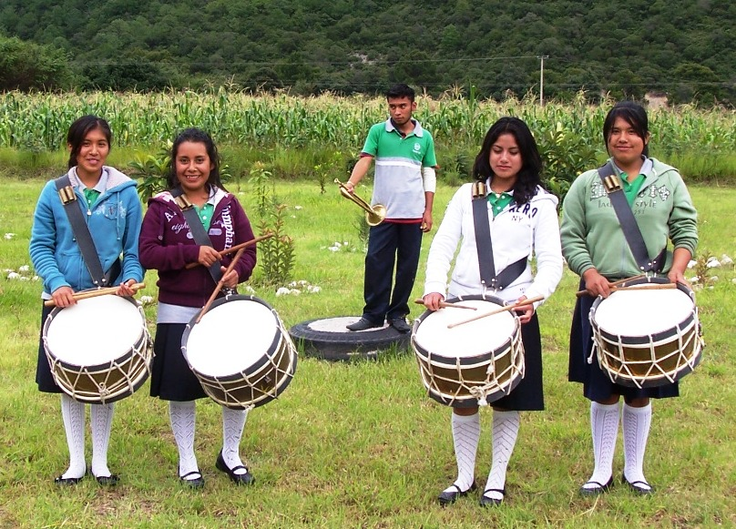 Banda de Guerra del Instituto de Estudios de Bachillerato de Oaxaca, plantel Achiutla. México